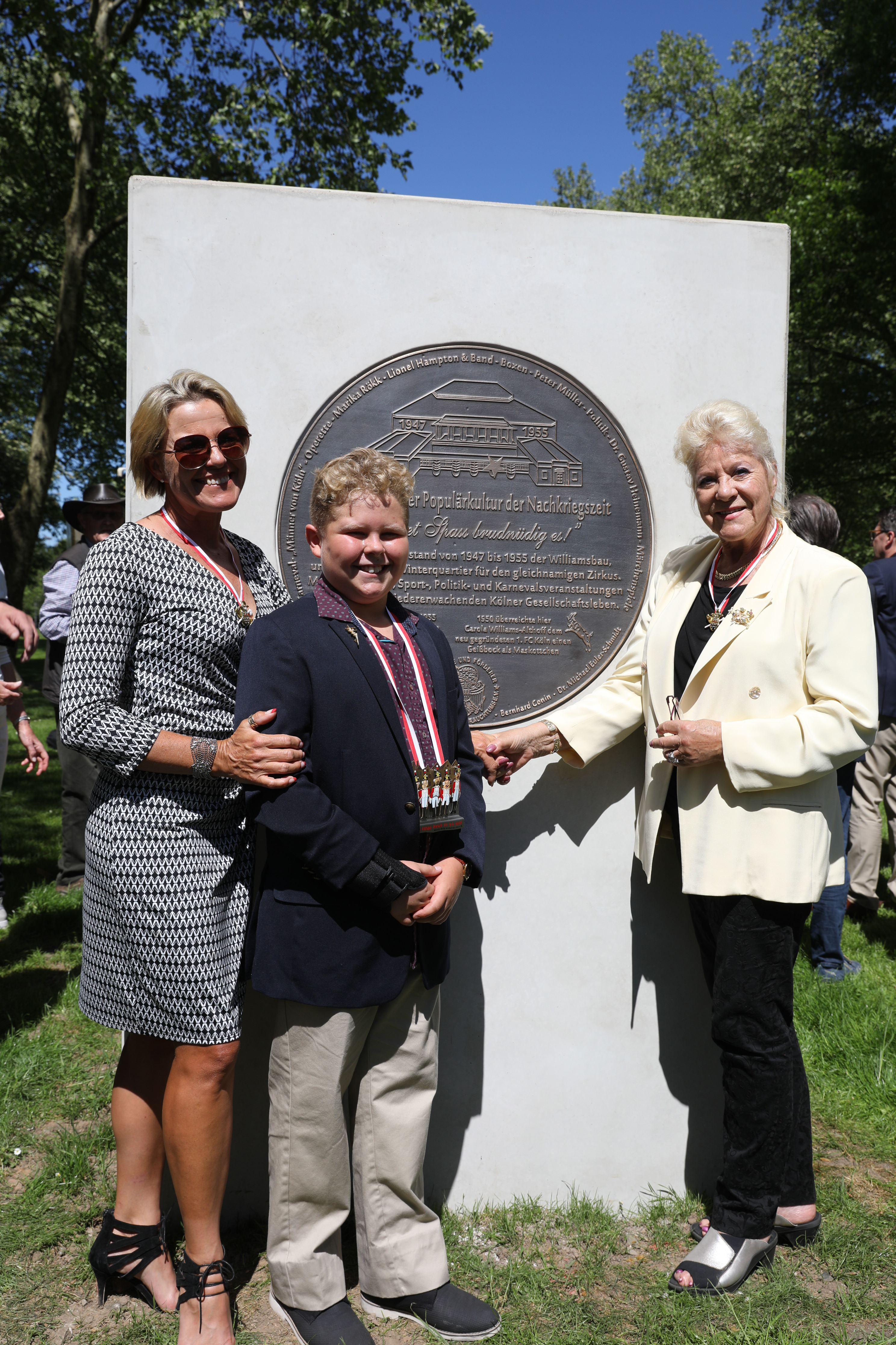 Enthüllte Stele zur Erinnerung an den Standort des Williams-Baus, v.l.nr.: Tochter Jeanette Williams (r.), Enkelin Carolina und Urenkel Dominik